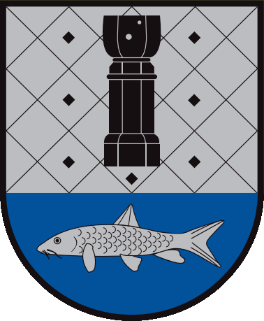 Stadtwappen seit 2016